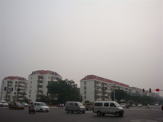 中文（中国大陆）: 河北省唐山市